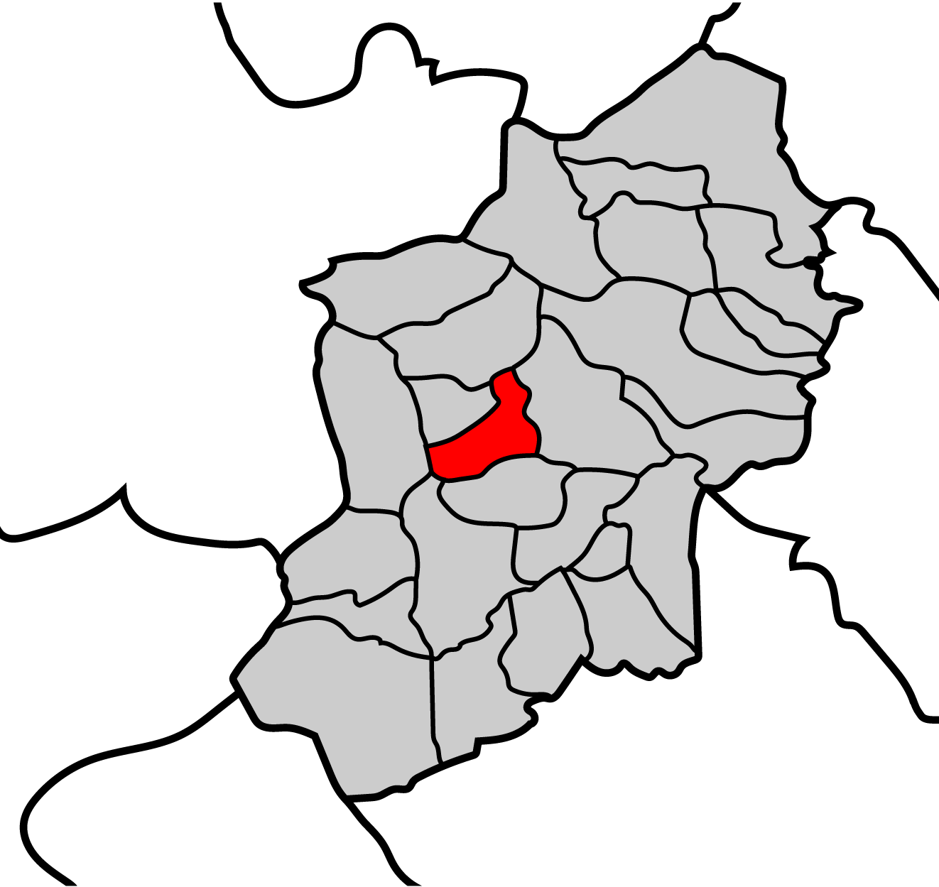 Mapa de la parroquia de Cadoalla ayuntamiento de Becerreá